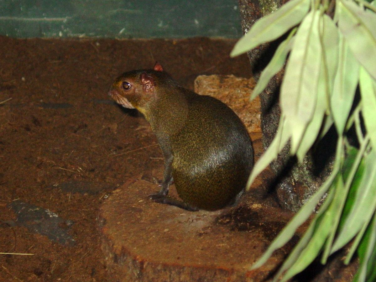 self made